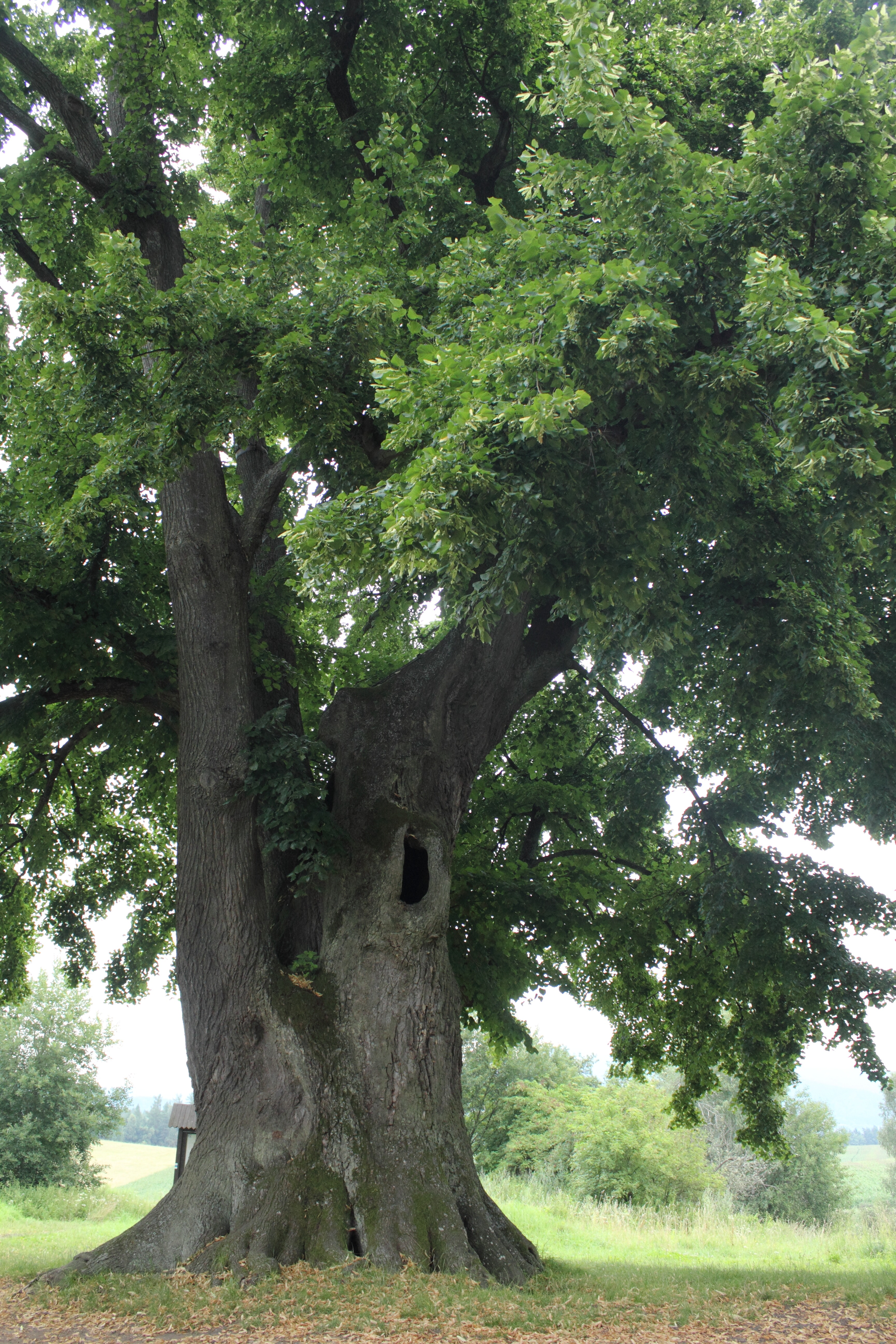 Tisíciletá lípa